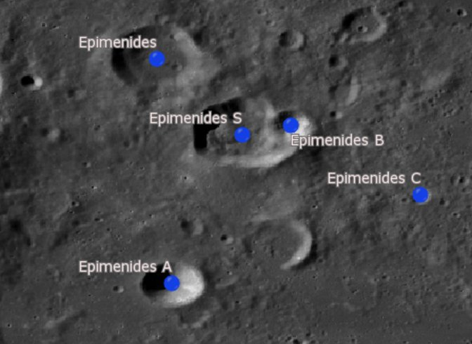 Cráter lunar Epimenides. Cráteres satélite. (Imagen LROC)